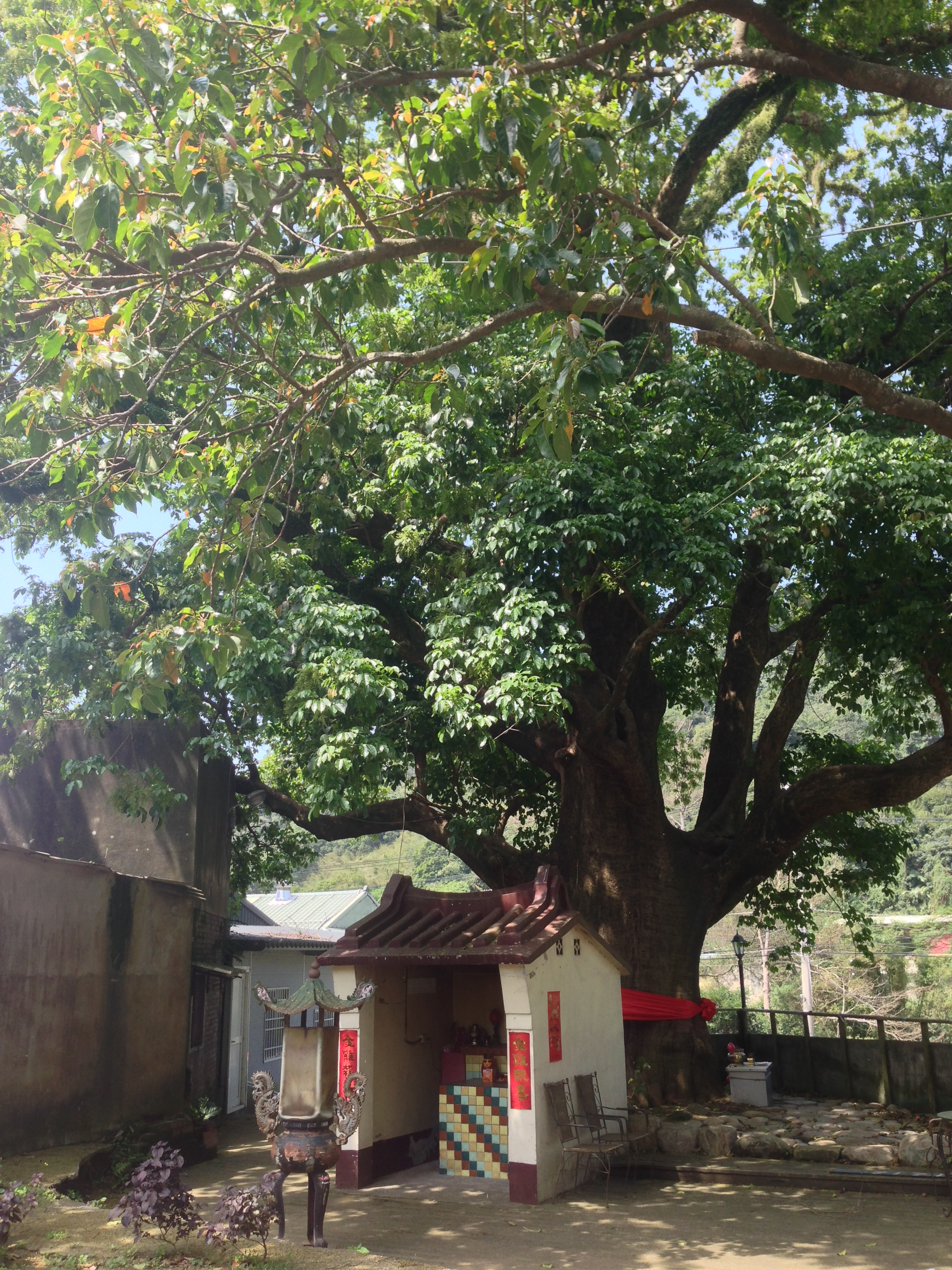 中文（台灣）: 華龍村茄苳樹與石板伯公廟